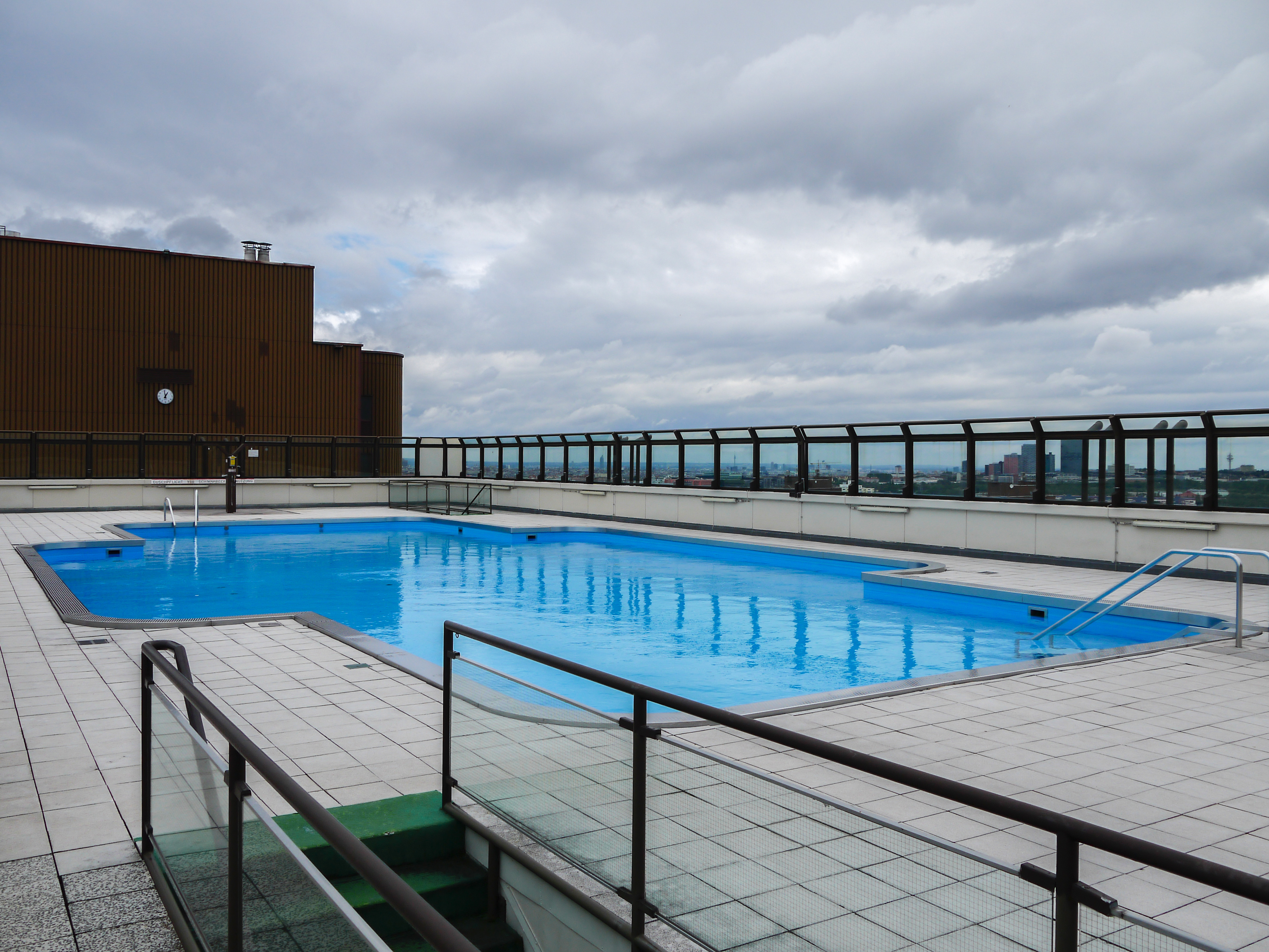 Alterlaa Schwimmbad (hinterer A-Block)